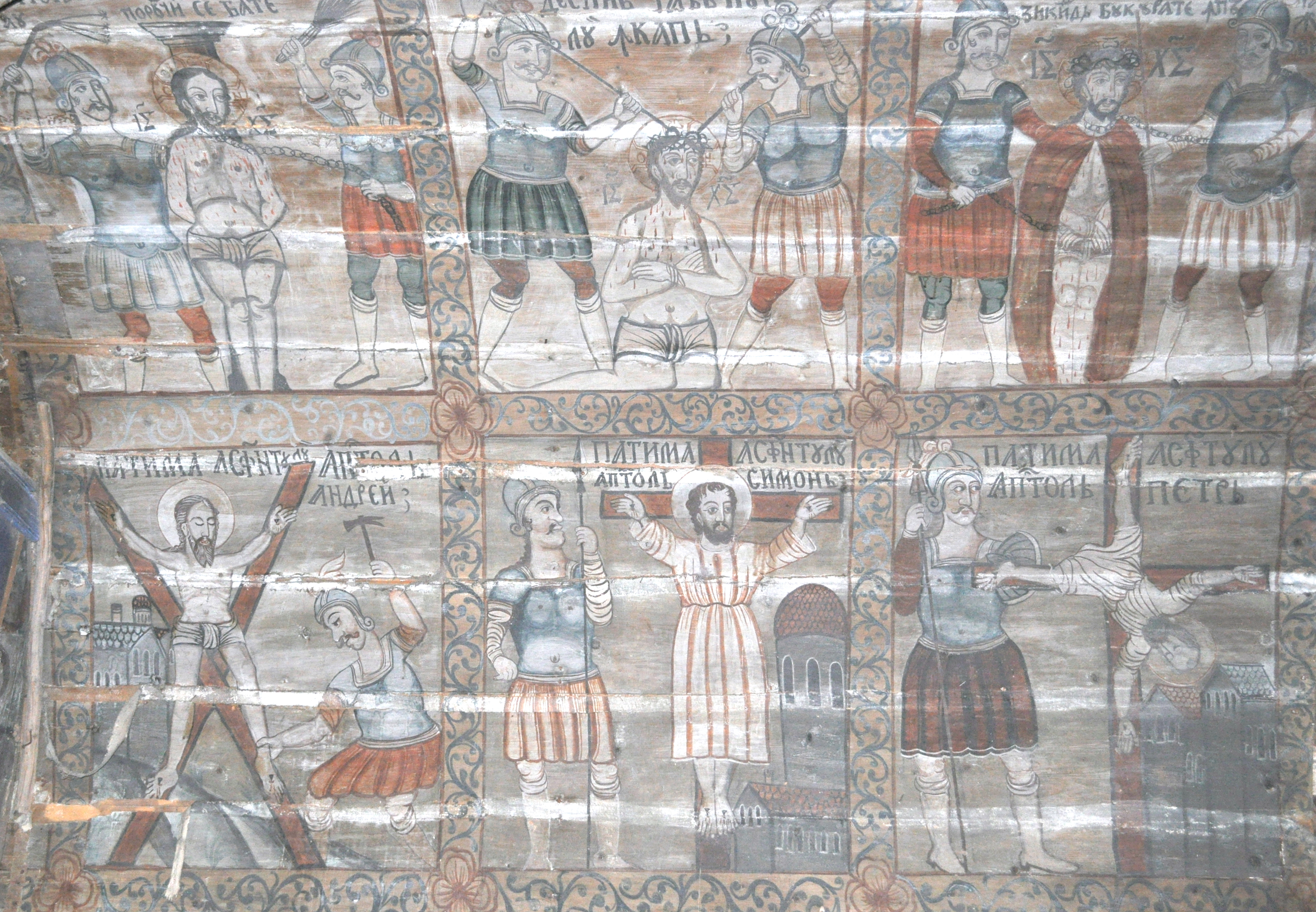 Biserica de lemn „Sfinții Arhangheli” din Băița, Mureș